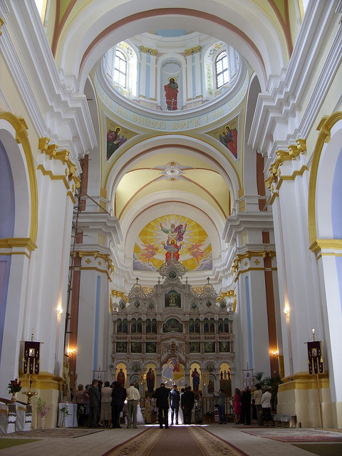 Wnętrze dawnego kościoła jezuitów w Krzemieńcu, obecnie soboru Przemienienia Pańskiego